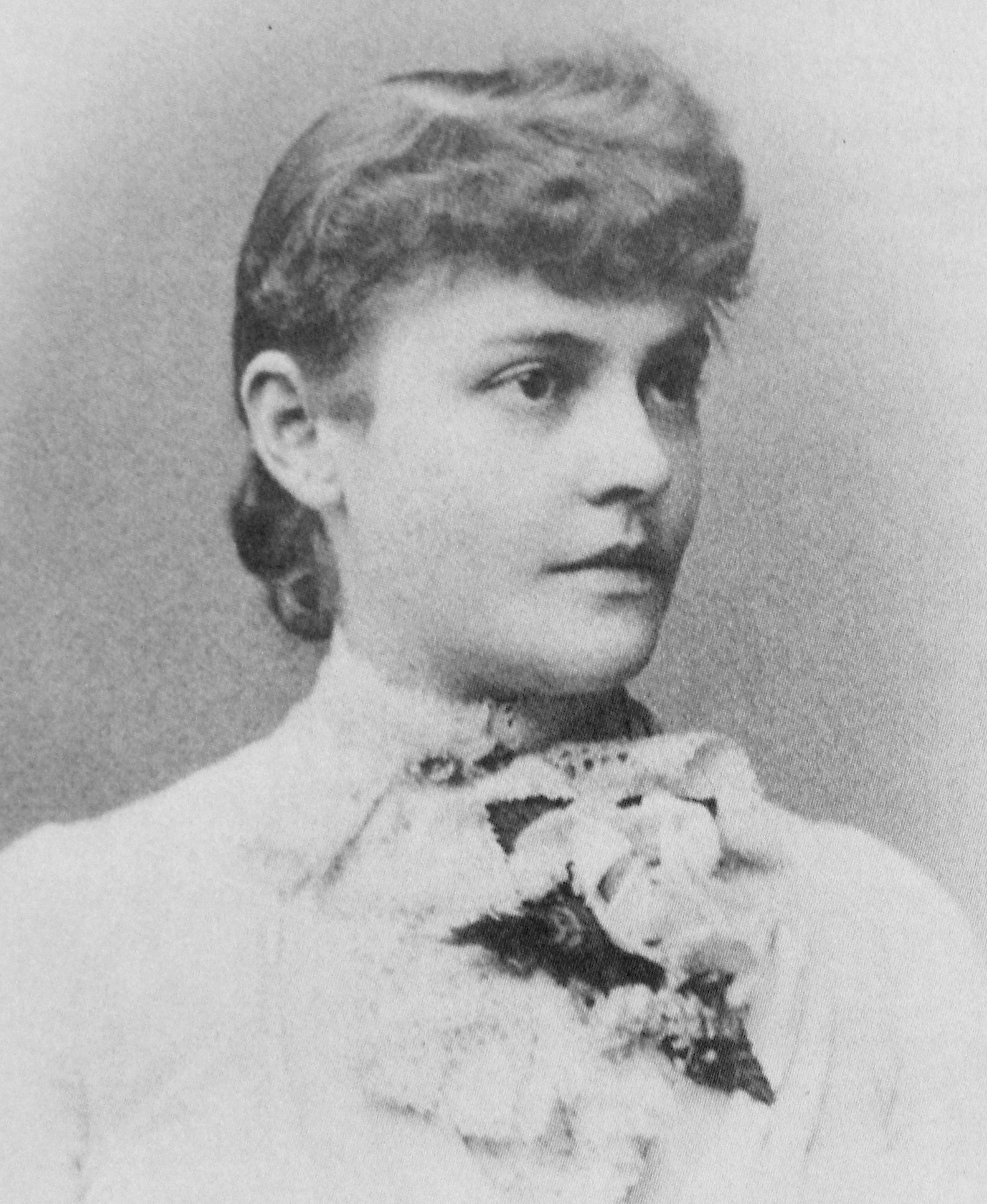 Дагмар Энгельхарт (1863 - 1942) по прозвищу "Драгоценность"